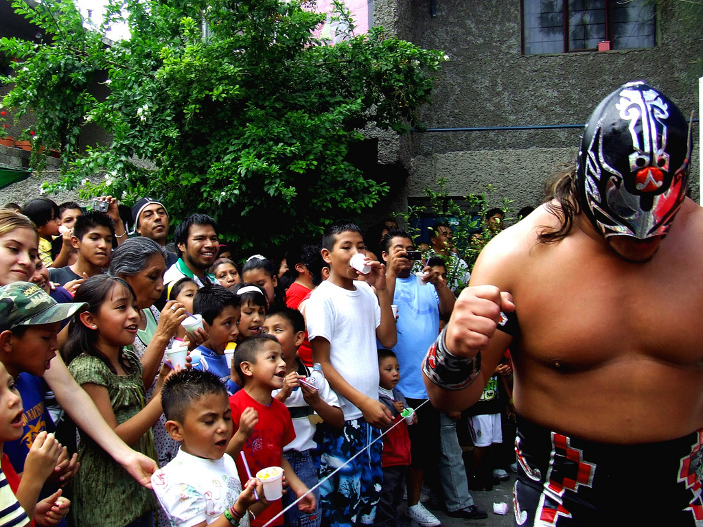 Ultimo Guerrero in August 2010.